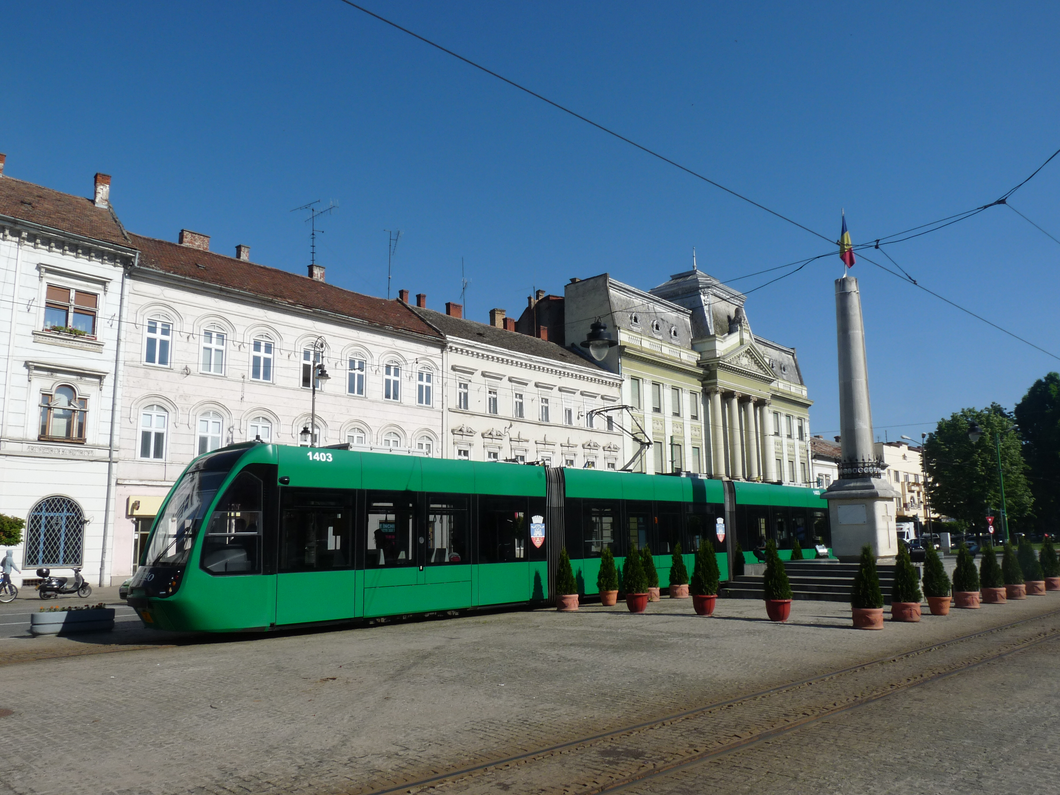 Trams in Arad